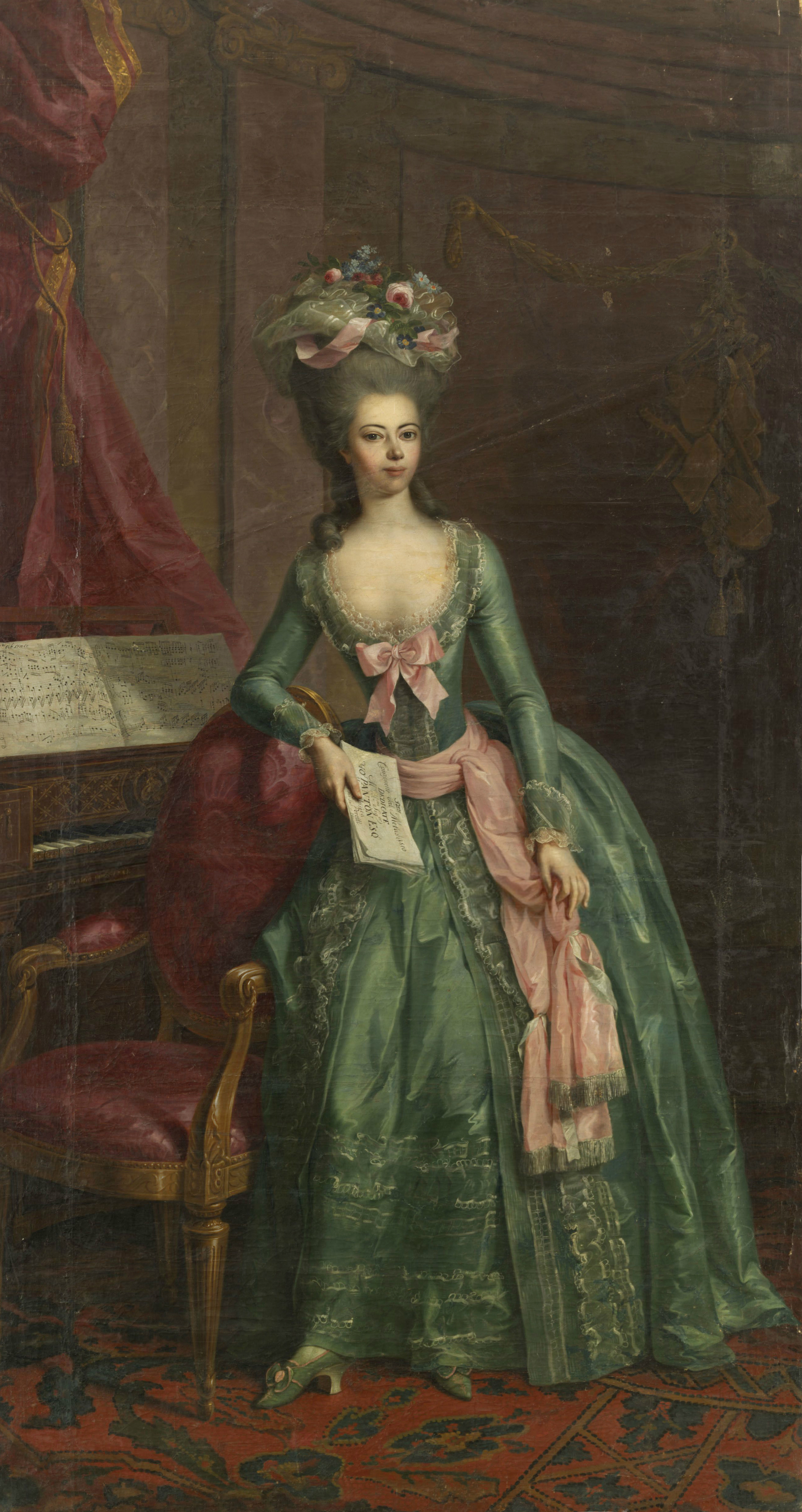 Das repräsentative, ganzfigurige Bildnis der Juliane zu Schaumburg-Lippe (1761-1799) in Lebensgröße führt die junge Fürstin als Liebhaberin der Musik vor. In einem Innenraum vor einem Klavier stützt sie sich auf die Lehne eines Armlehnsessels und hält ein Notenheft in der rechten Hand. Sie posiert in einem eleganten Galakleid aus grüner Seide mit rosafarbener Miederschleife und gleichfarbiger Schärpe. Ebenso wie die Robe entspricht auch die hochtoupierte Frisur mit dem reichen Kopfschmuck aus Kunstblumen und Seidenschleier und den einzelnen, auf die Schultern fallenden Locken dem französischen höfischen Stil des Ancien Régime. Bei der mit Pilastern und Stuckreliefs verzierten Wandnische und der Draperie griff Tischbein d. Ä. auf konventionelle Requisiten fürstlicher Repräsentationsporträts zurück. Das Bildnis wird – wie viele Gemälde Tischbeins im Spätwerk der 1780er Jahre – von einer gedämpften warmen Farbskala aus Braunrottönen bestimmt, denen komplementär ein kräftiges Grün entgegengesetzt ist.